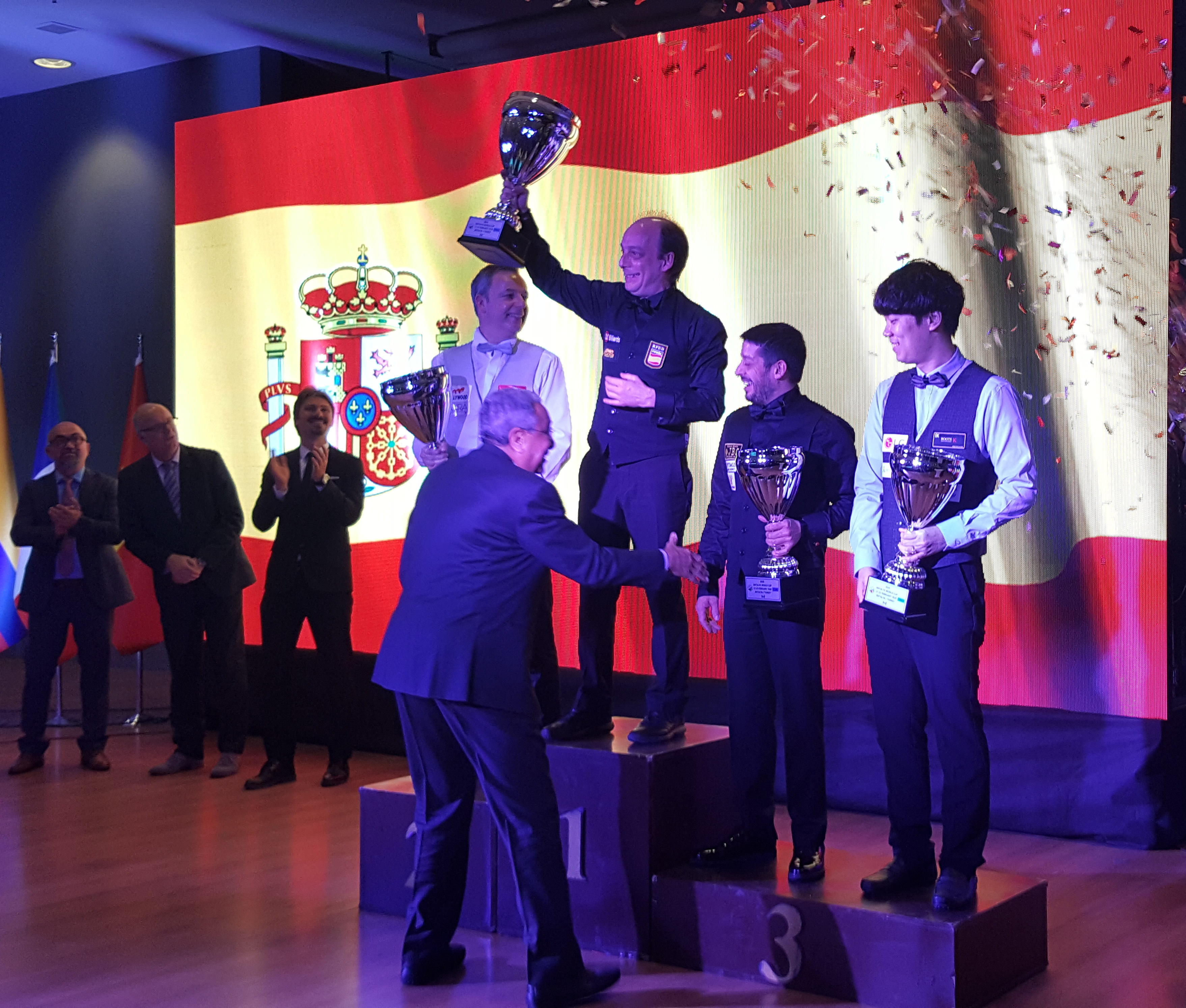 Siegerehrung beim Dreiband-Weltcup 2020/1 in Antalya